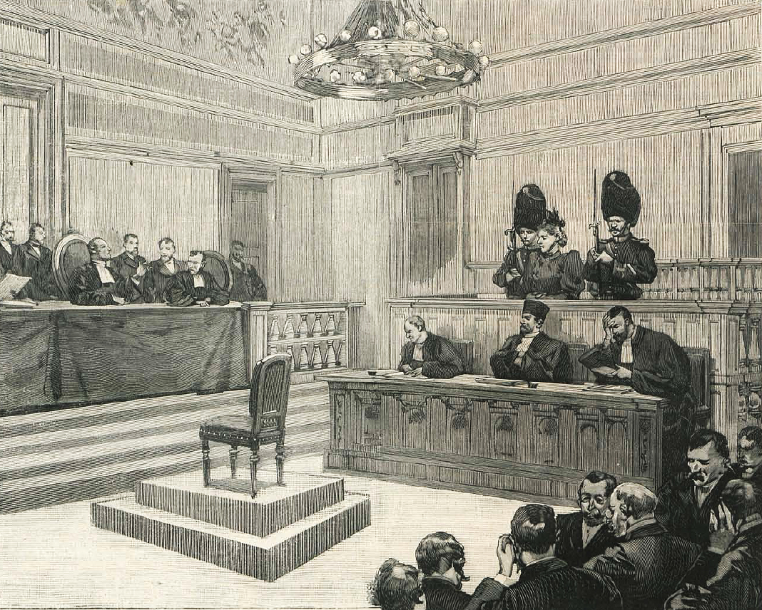 L'illustration - 12 janvier 1895 - Marie-Thérèse Joniaux-Ablay répond à ses juges. Cours d'assisse d'Anvers janvier 1895